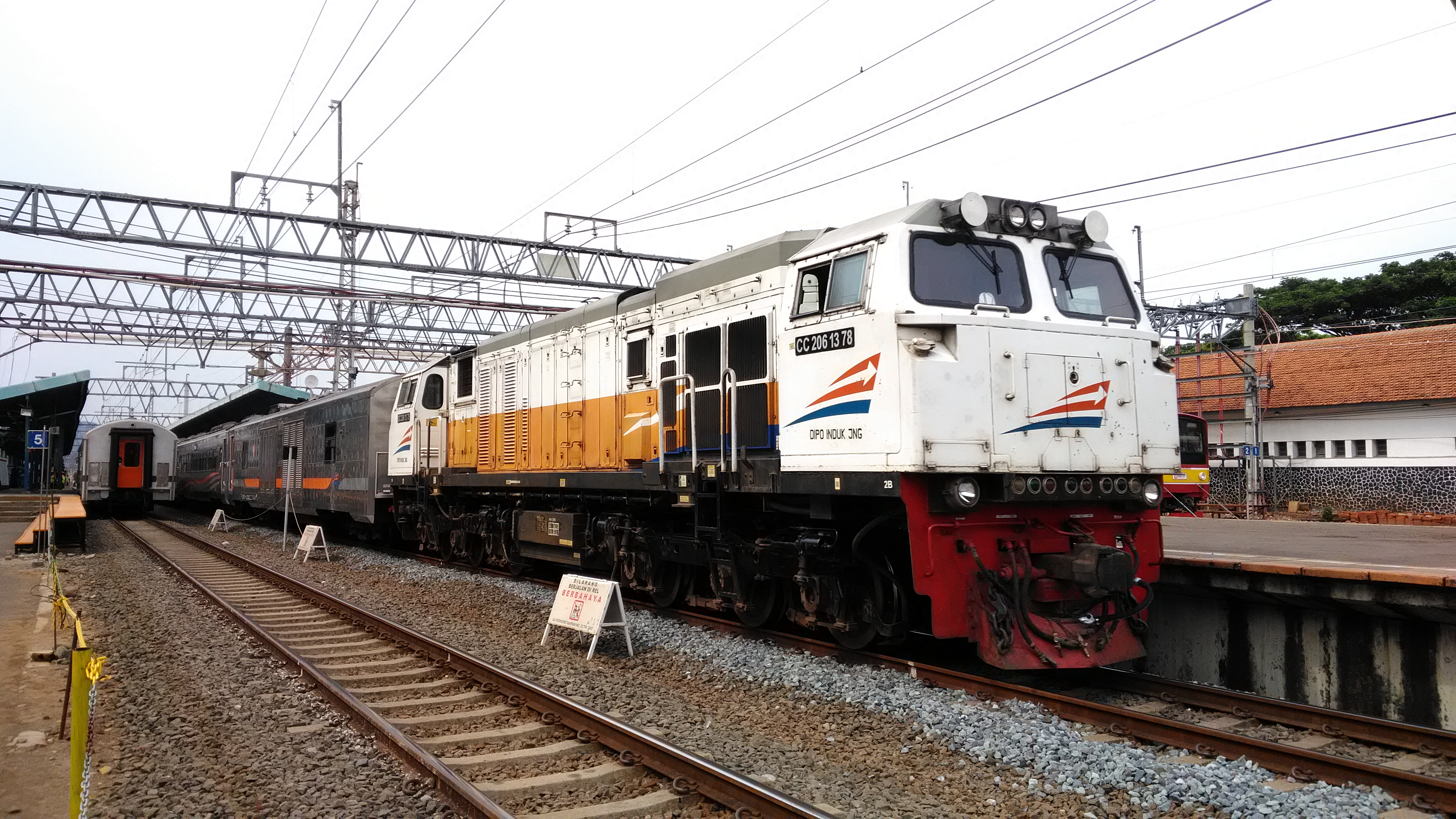 Sunda: KA Turangga ngaliwat Stasion Manggarai